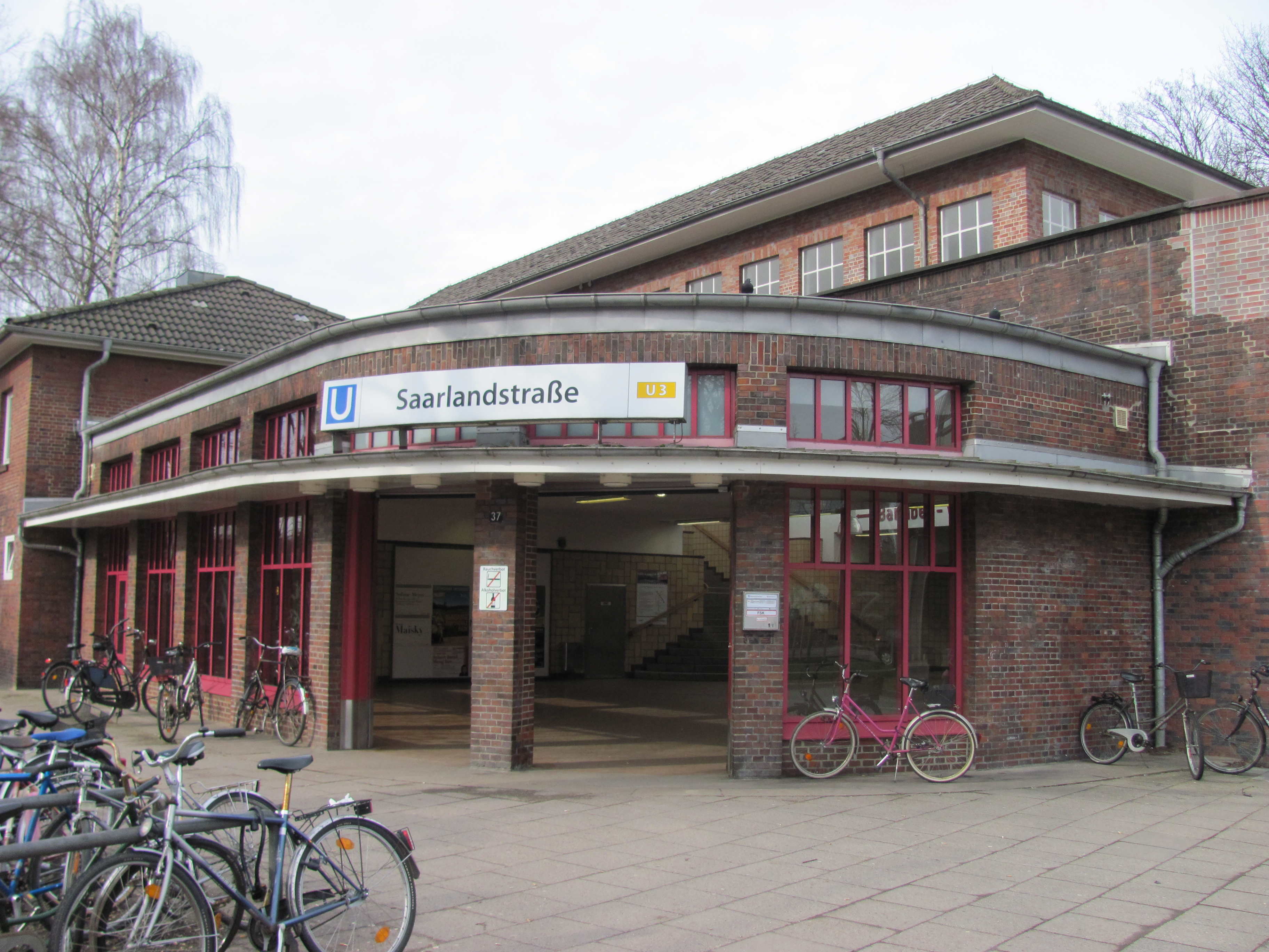 Zugangsgebäude zum U-Bahnhof Saarlandstraße